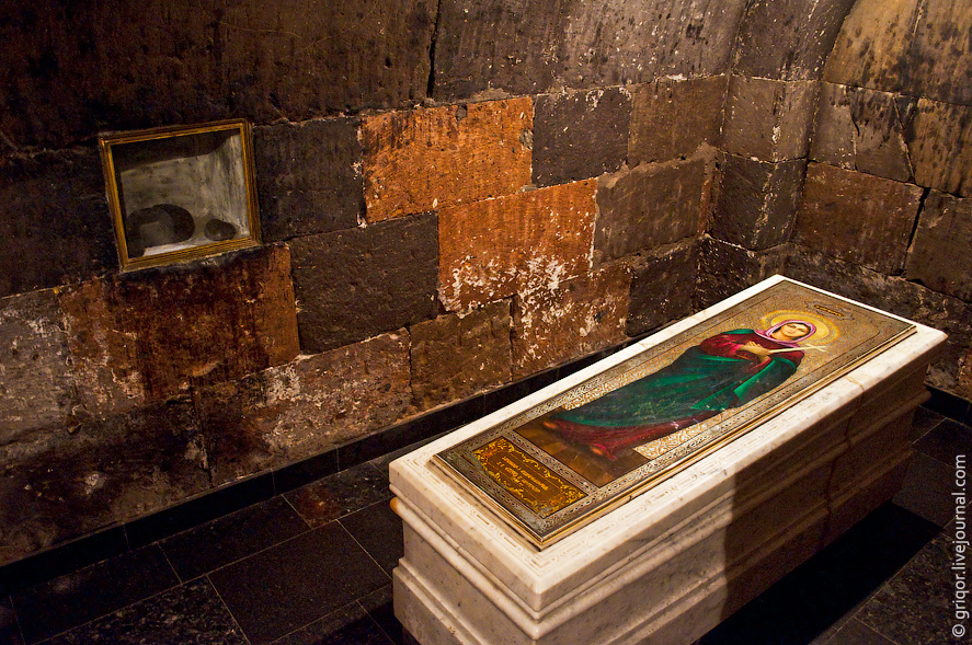 Склеп